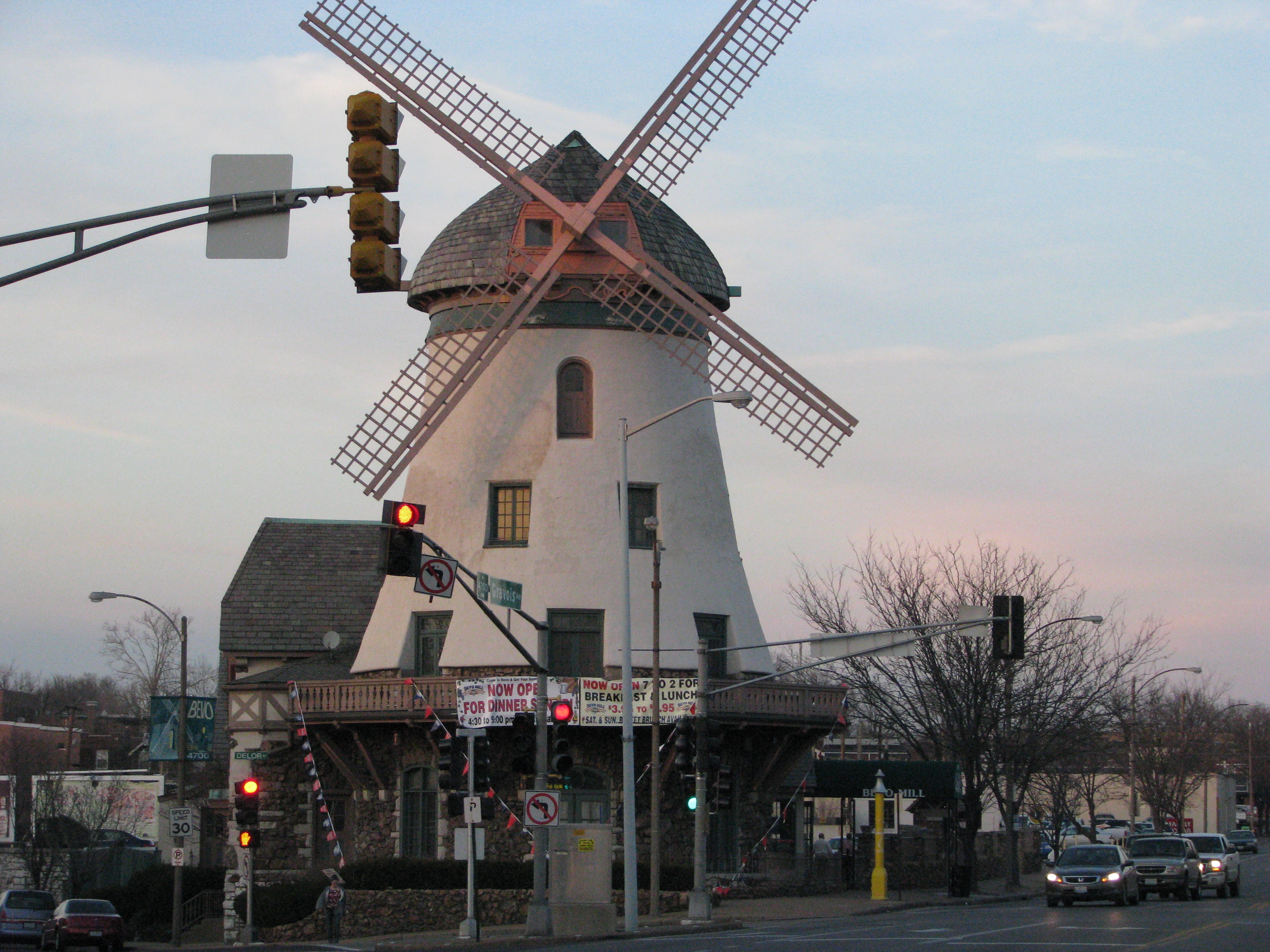 Bevo Mill, St. Louis, Missouri